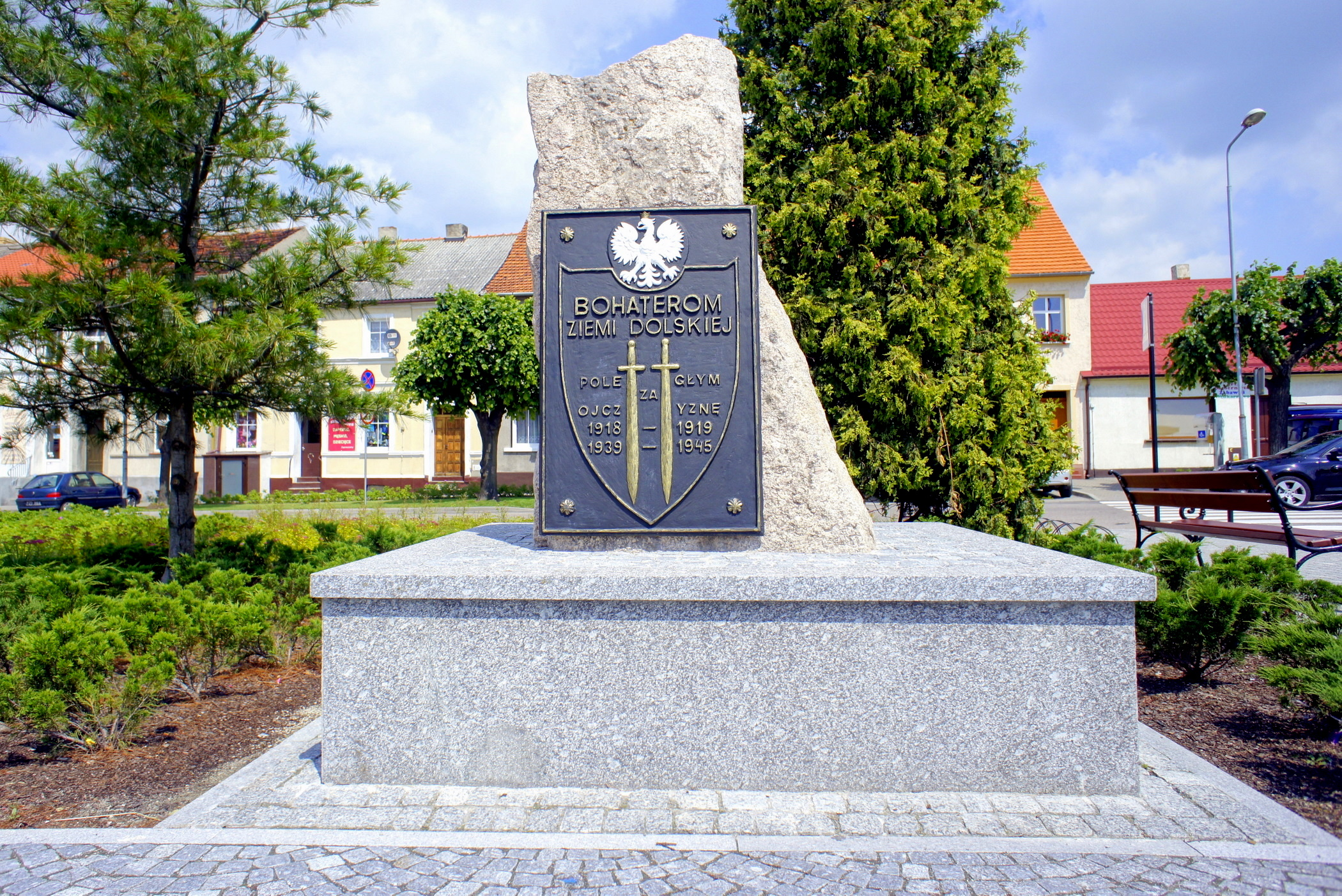 Dolsk, powiat śremski w Wielkopolsce. Pamięci poległym za Ojczyznę - pomnik na rynku.